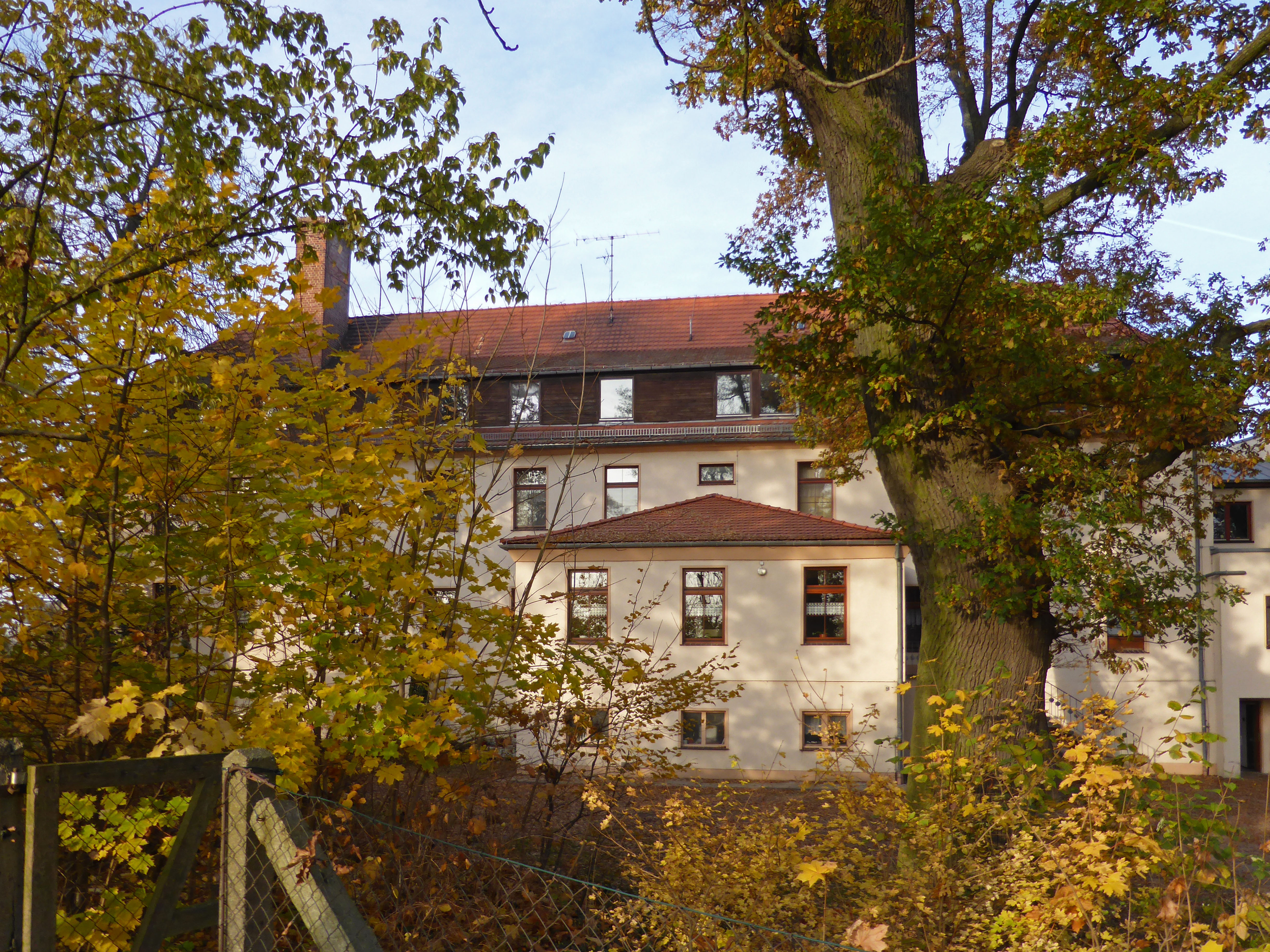 Schloß Sandau nahe der Elbe, heute Caritas Altenpflegeheim St. Marien